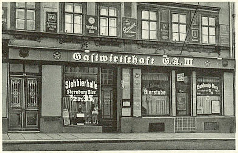 Gaststätte G. A. III (Gerichtsamt III) im Peterssteinweg 3 in Leipzig (im Zweiten Weltkrieg zerstört)